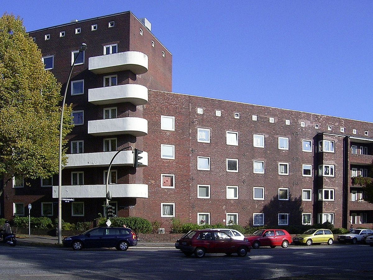 Wohnblock in der Habichtstraße in Hamburg-Barmbek-Nord, erbaut 1927/28 von Karl Schneider für die "Gemeinnützige Wohnungsbaugesellschaft Groß-Hamburg"This is a photograph of an architectural monument.